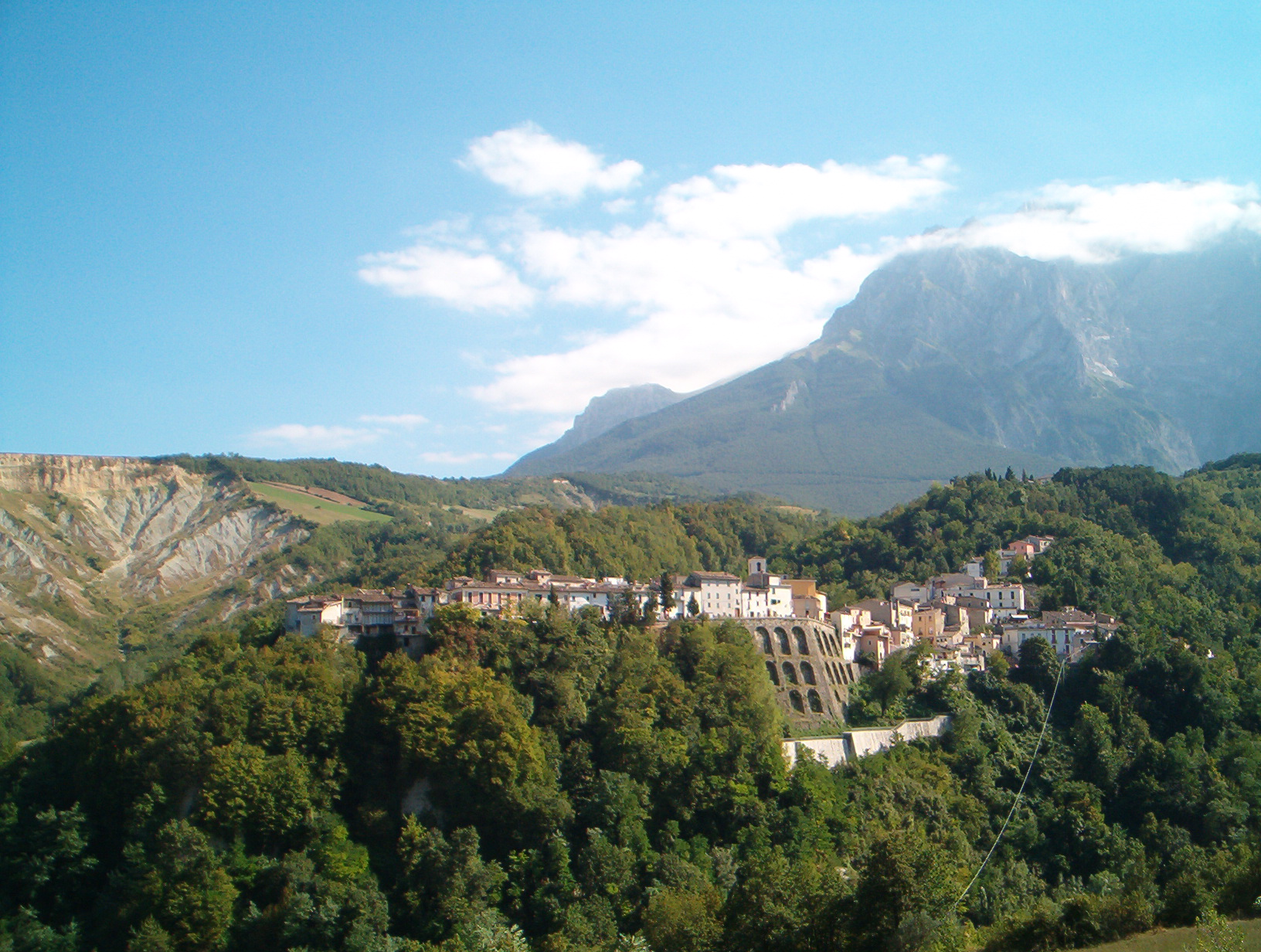 Foto di Castelli